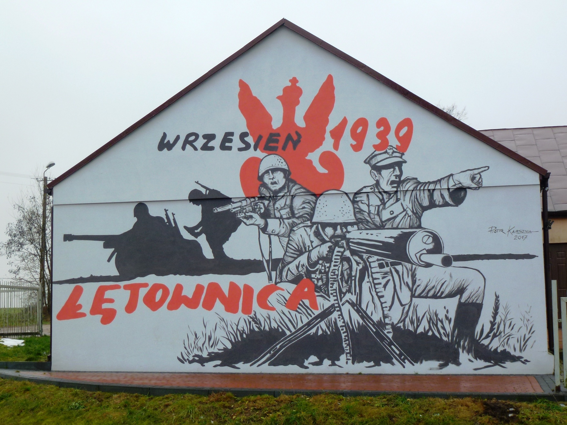 Łętownica - mural na budynku straży pożarnej upamiętniający bitwę 18 Dywizji Piechoty w dniach 12-13 września 1939 roku. Autor Piotr Karsznia, 2017 r.